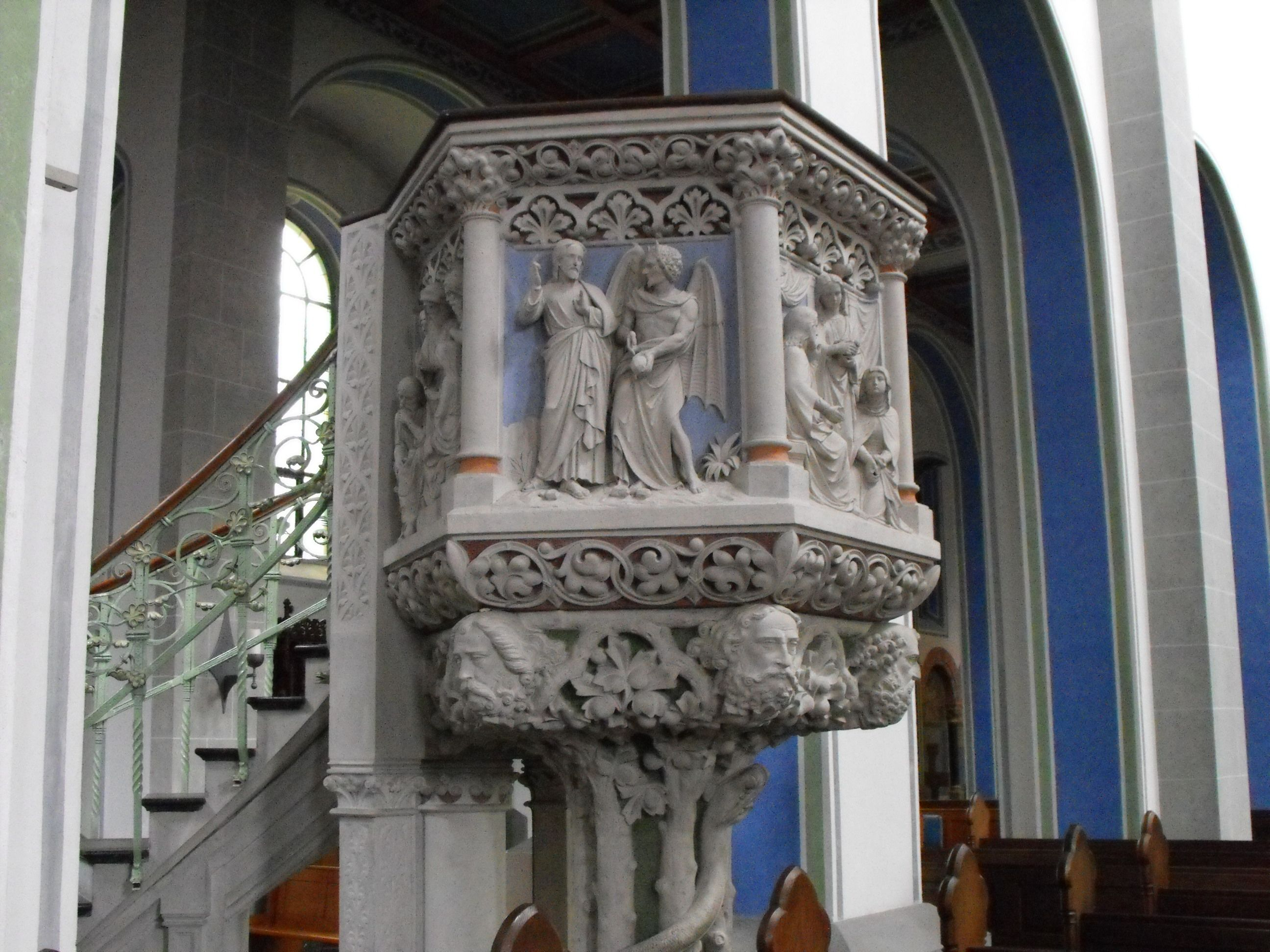 Kanzel von St. Jakob in AachenThis is a photograph of an architectural monument., no. 0